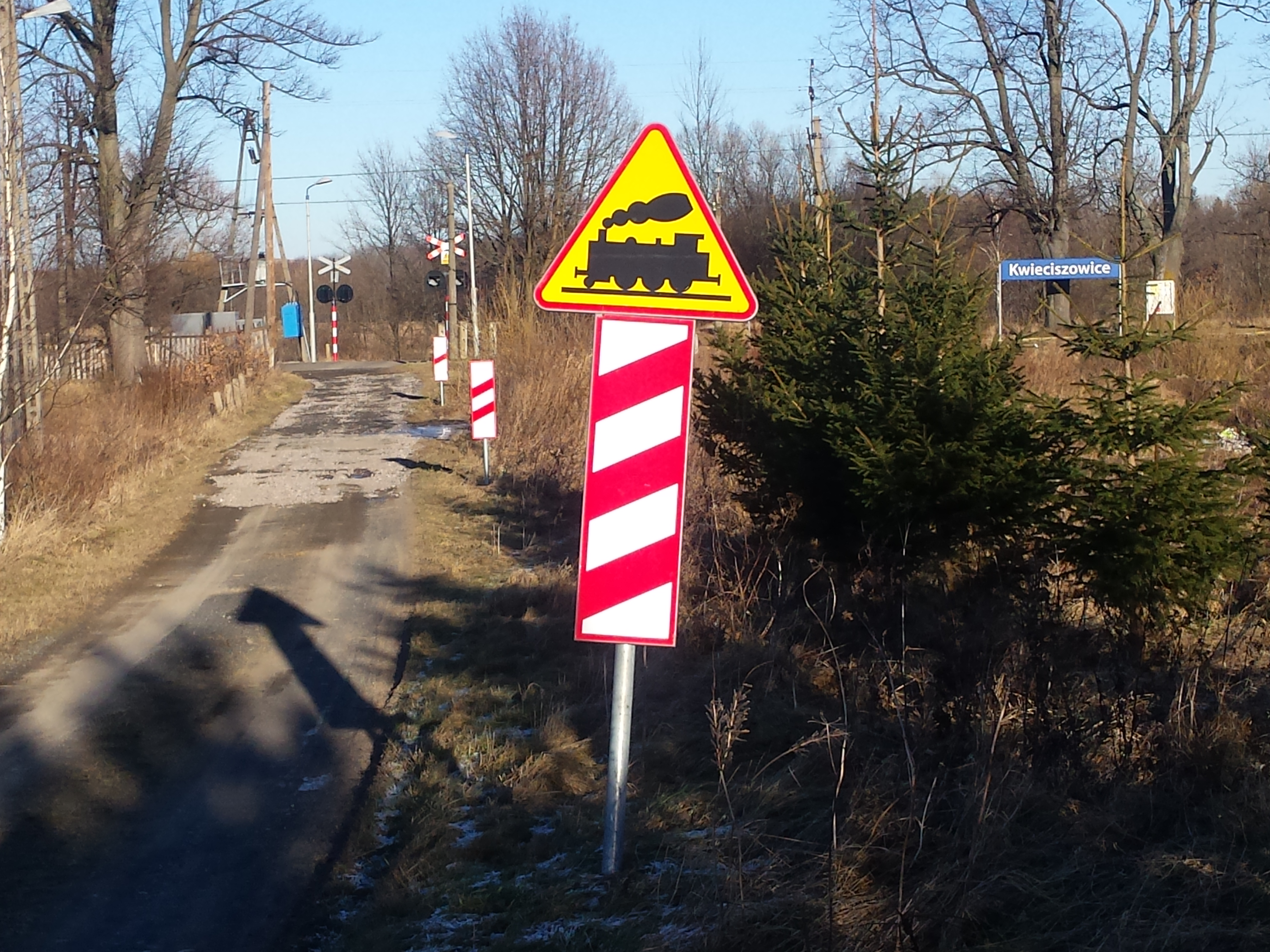 Widok na przejazd kolejowy od strony Kwieciszowic. Po lewej skrzyżowanie drogi z trakcją kolejową, po prawej tablica z nazwą przystanku.